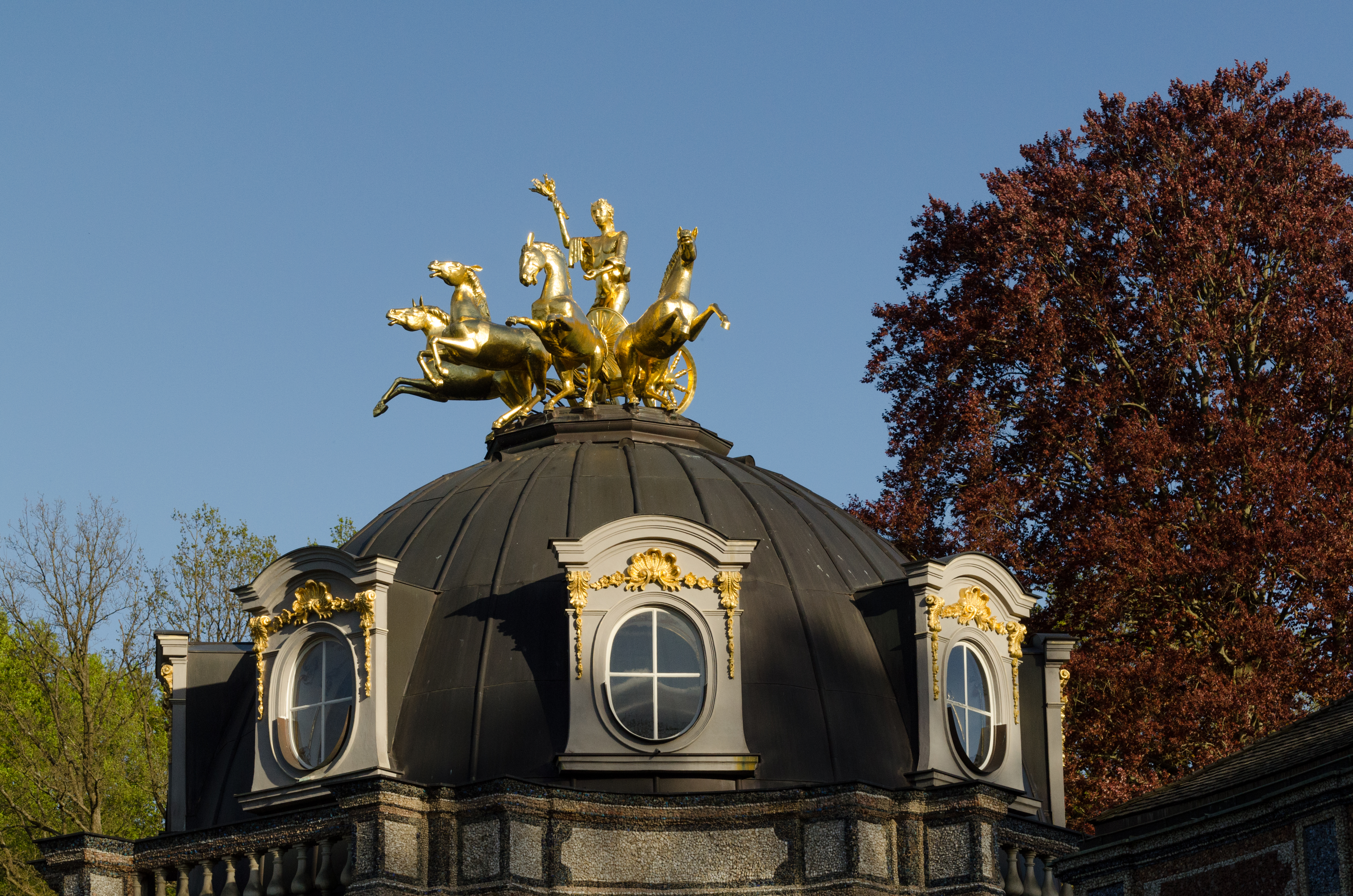 Bayreuth, Eremitage, Neues Schloss, Sonnentempel